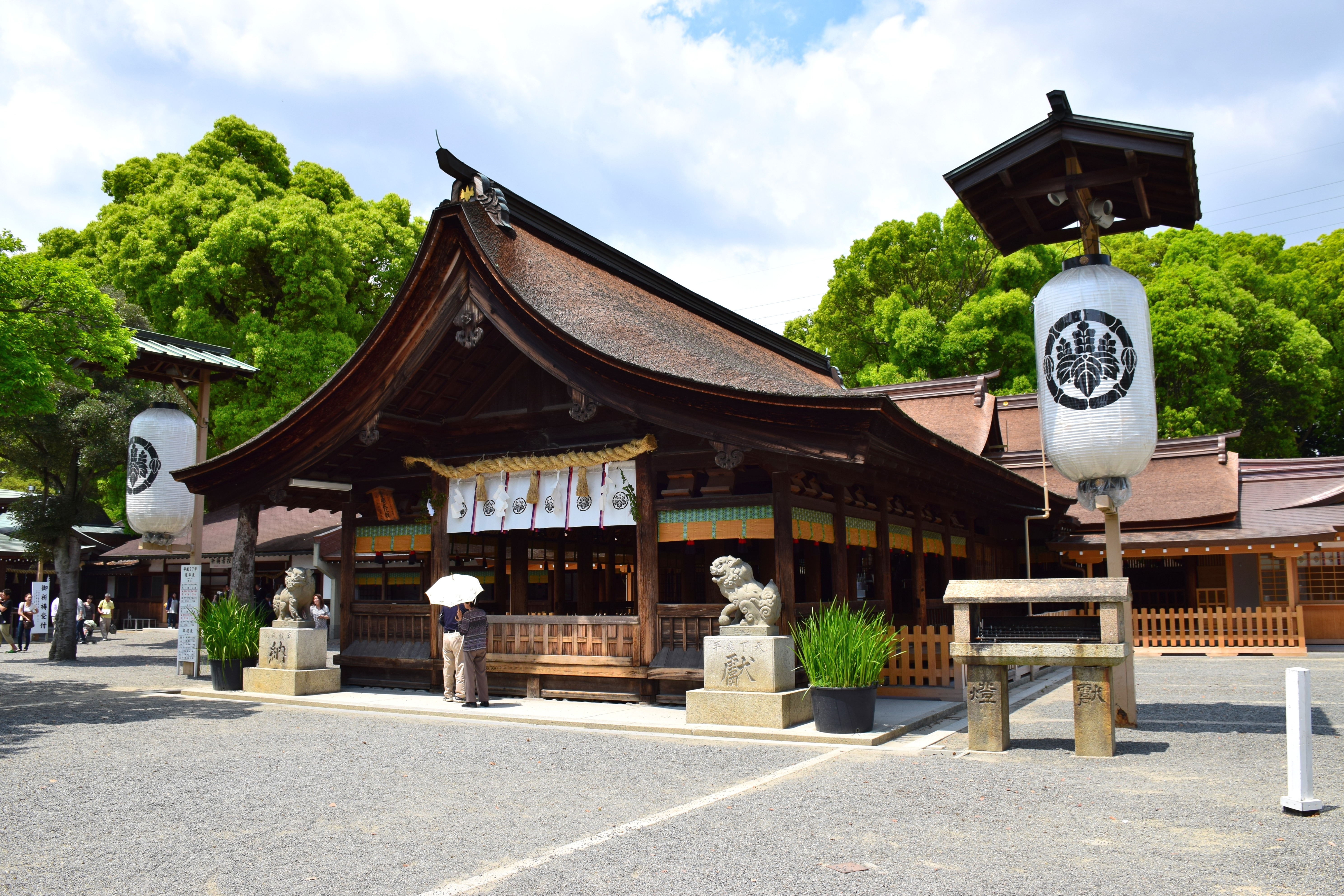 尾張大国霊神社拝殿